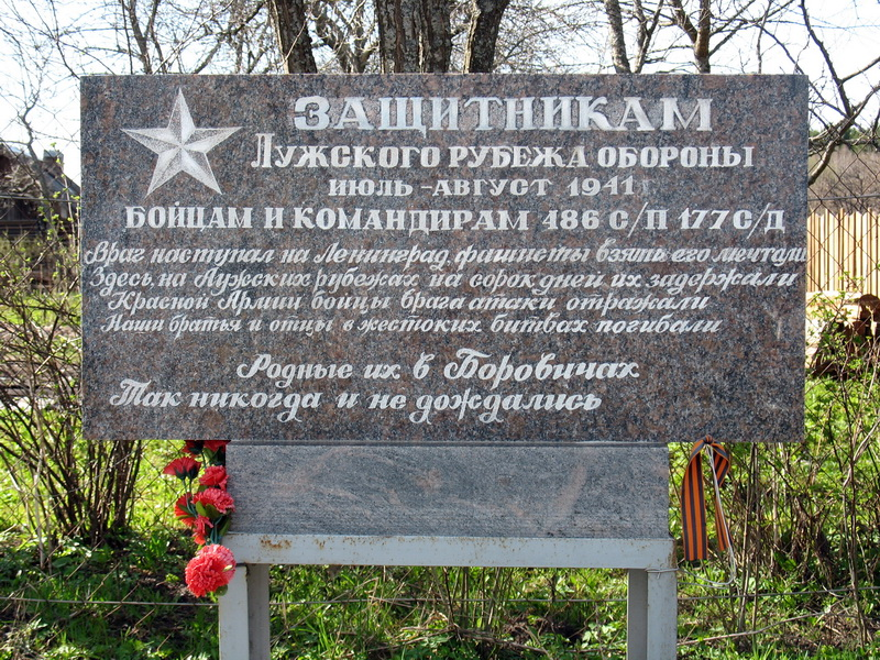 12170 Памятный знак защитникам Лужского рубежа Координаты для GPS (WGS 84): N 58° 40' 50.880 E 29° 44' 44.099 Расположение: д.Вяжище Описание: Памятник установлен, сыном и внуками пропавшего без вести красноармейца 177 дивизии, 486 сп, 2 бат., 5 роты, Иванова Василия Григорьевича. Дата установки - 09 октября 2010г. 483 и 486 полки этой дивизии были сформированы в 1941 году, в Боровичах. 486 стрелковый полк занимал оборону в районе неселённых пунктов Смерди, Бараново, Вяжище, Корпово, Лесково.